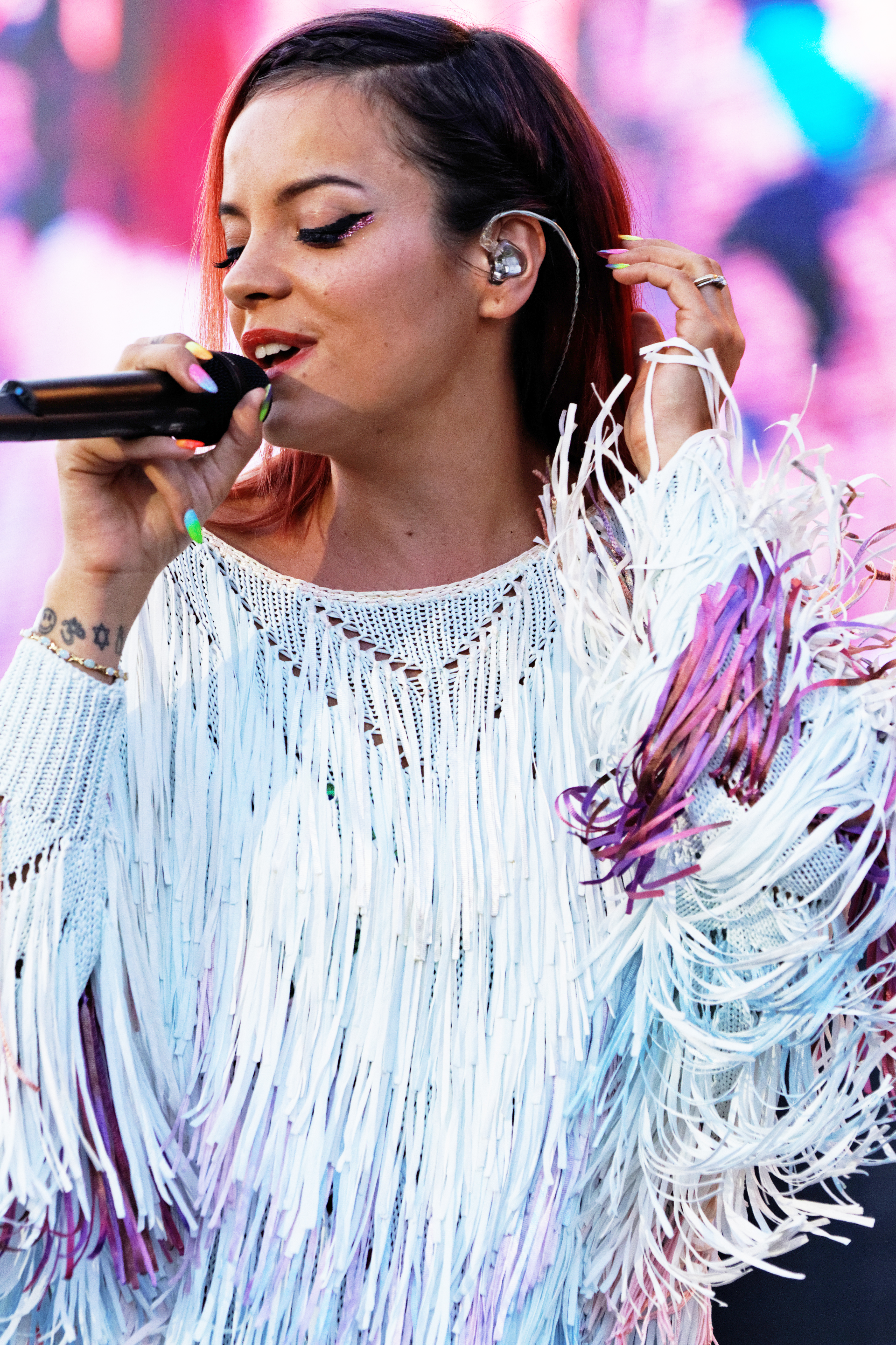 Lily Allen en concert sur la scène Glenmor lors du festival des Vieilles Charrues 2014.